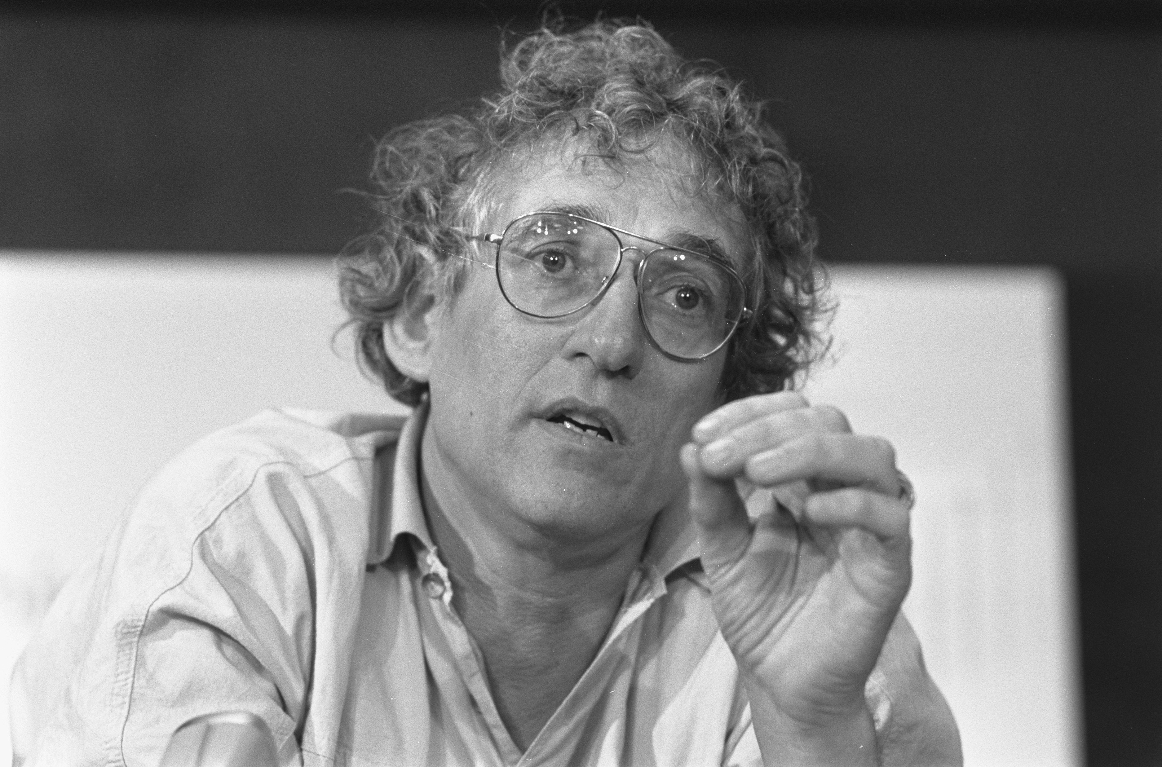 Klaas de Jonge na 2 jaar Zuidafrikaanse gevangenschap terug op Schiphol; Klaas de Jonge staat pers te woord Datum 8 september 1987